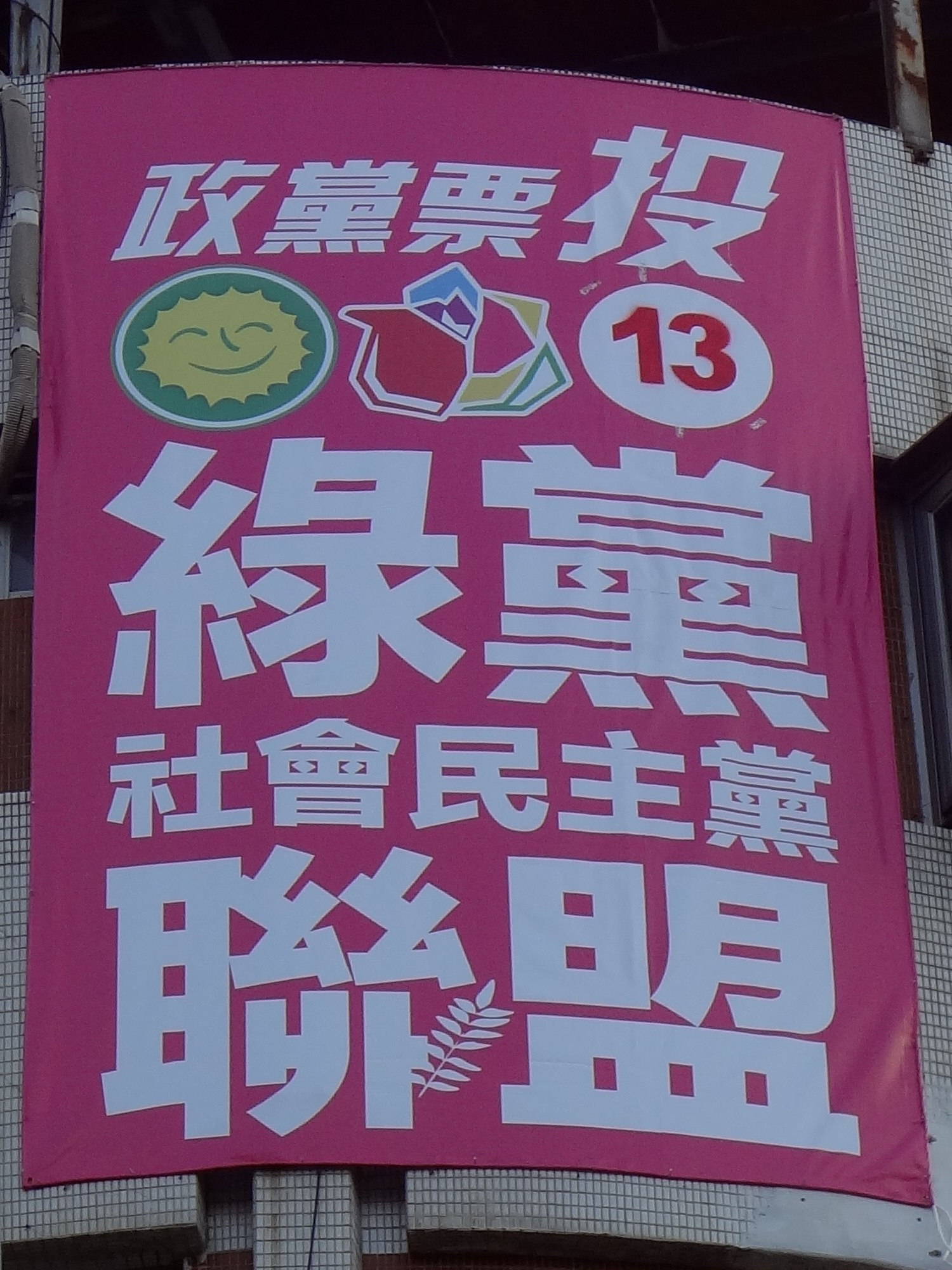 2016年中華民國立法委員選舉，臺灣基隆市七堵區福五街、百六街口，綠黨社會民主黨聯盟廣告布幔。2016年1月28日撤除。